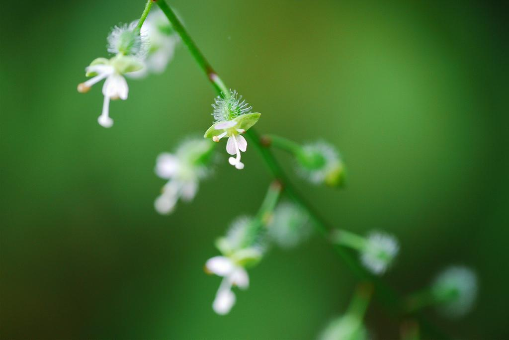 Circaea mollis：ミズタマソウ 2010/09/4 和歌山県田辺市：Tanabe City. Wakayama pref. Japan